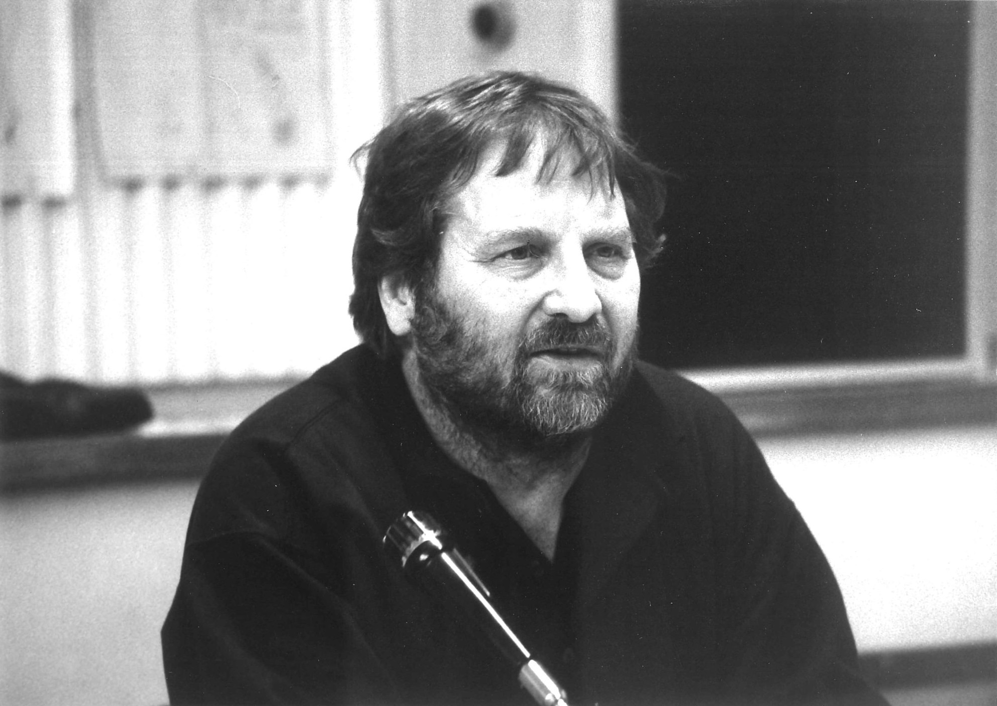 Der Regisseur Joachim Staritz bei einer Hörspielproduktion between 1990 and 1995 date QS:P,+1990-00-00T00:00:00Z/8,P1319,+1990-00-00T00:00:00Z/9,P1326,+1995-00-00T00:00:00Z/9 in einer Aufnahme des Berliner Fotografen Werner Bethsold.